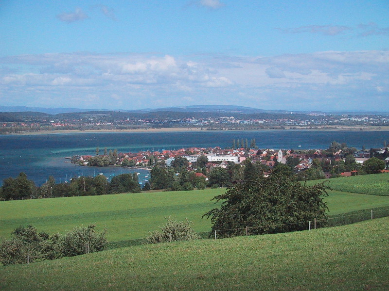 Ermatingen, Kanton Thurgau, Schweiz